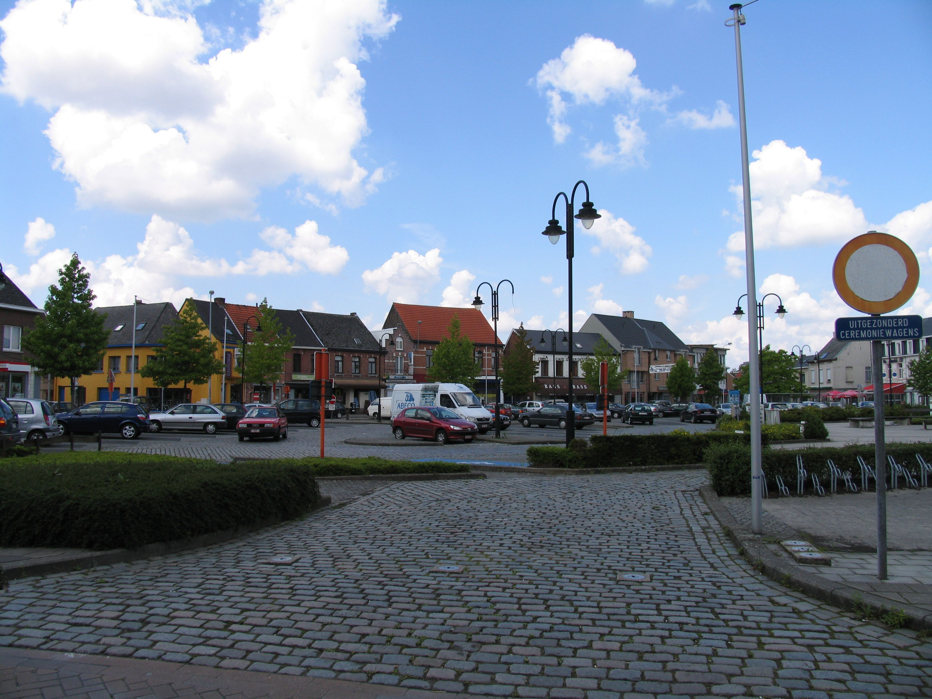 Dorpsplaats Sint-Katelijne-Waver, kijkrichting west